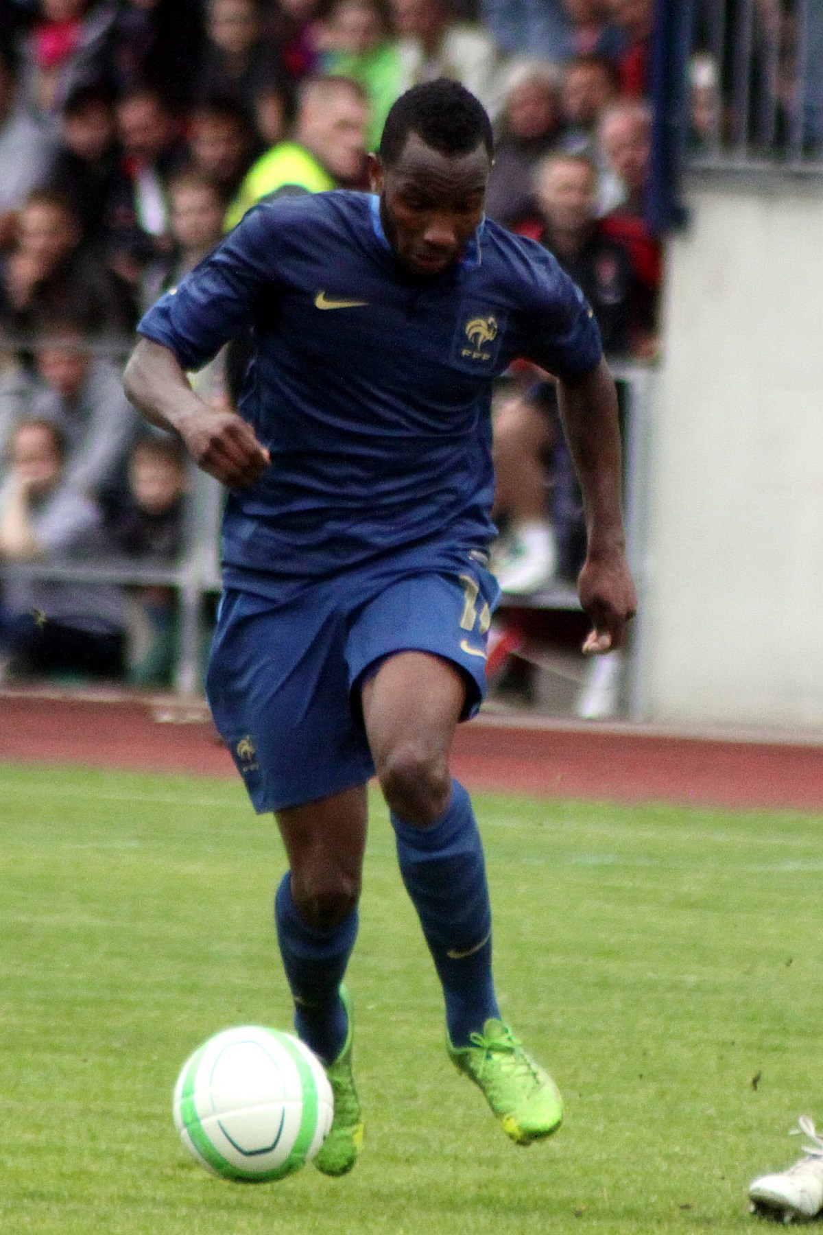 Qualifikationsspiel zur U-19 Fußball-Europameisterschaft: Österreich] gegen Frankreich am 10. Juni 2013 (0:1)] in Traiskirchen. - Das Foto zeigt Lenny Nangis (SM Caen). en Qualification for the 2013 UEFA European Under-19 Football Championship qualification Austria vs. France (0:1) on 2013-2013-06-10 in Traiskirchen. – The photo shows Lenny Nangis (SM Caen).